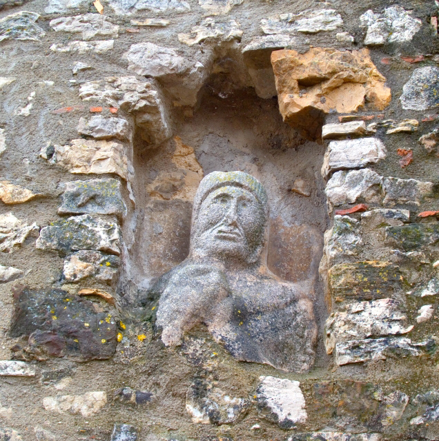 Fragneto Monforte (BN): busto nel centro storico raffigurante Gnito, guarriero longobardo che avrebbe fondato il paese.